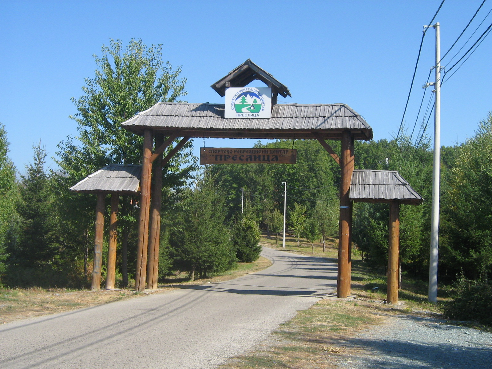 Главна капија на Преслици од пута према Стријежевици